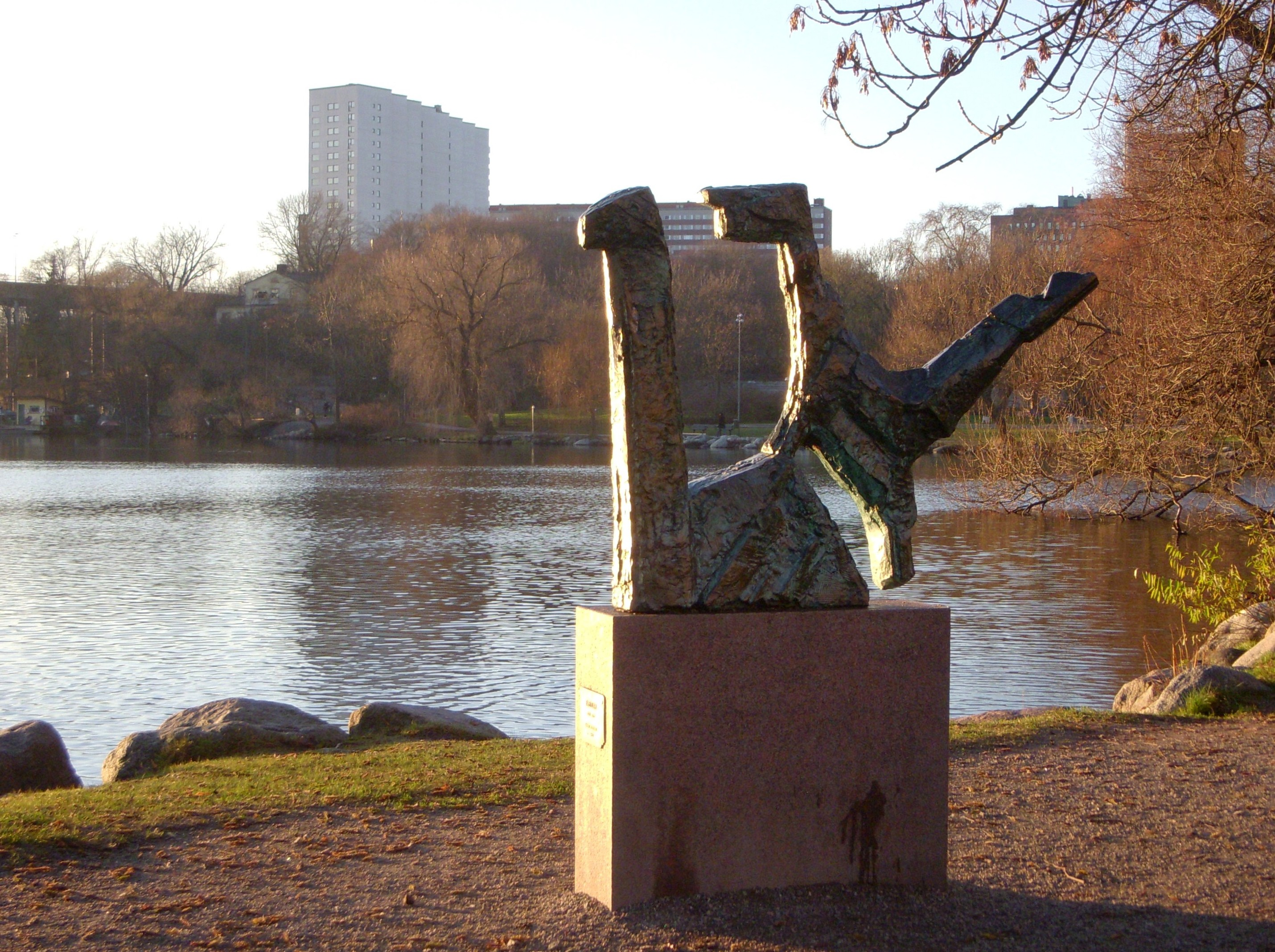 Norr Mälarastrands park, Stockholm, skulpturen "Fabeldjur" av Margot Hedeman.